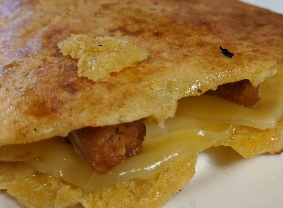 Taloa behi-gasna eta txistorrarekin. Erratzuko Zubi-punta tabernan egina.